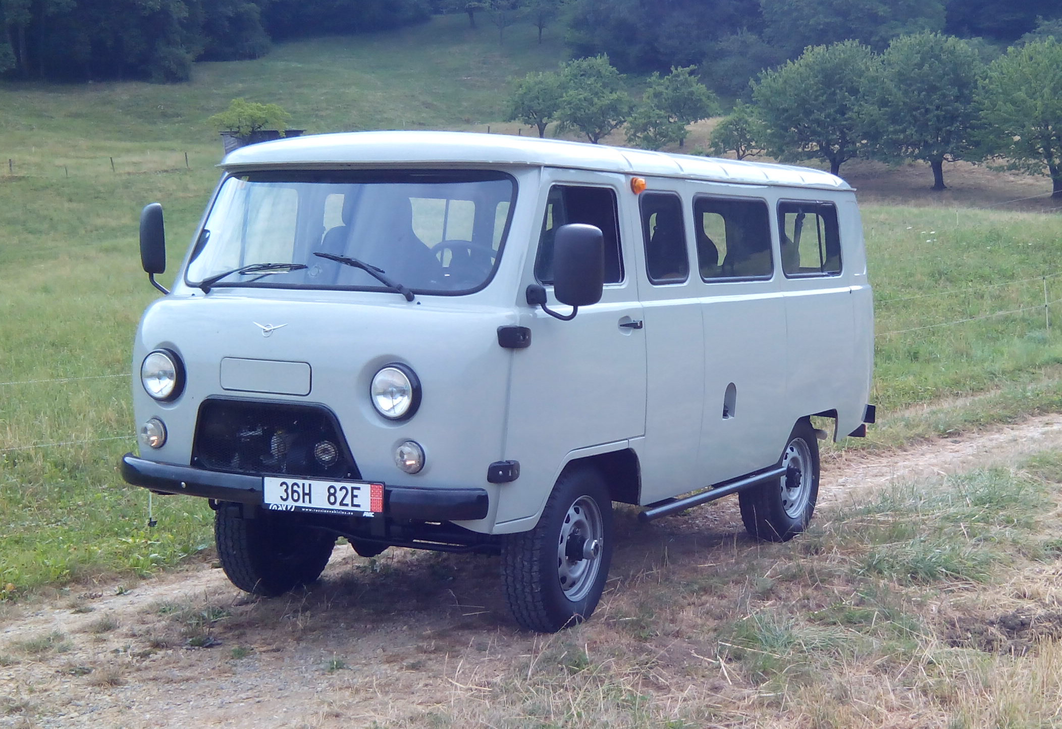 Minibus UAZ 2206 fabricada en 2015 para 7 pasajeros